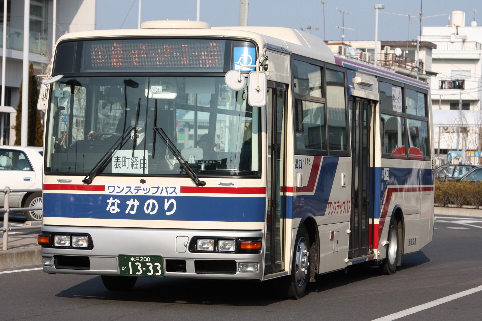 茨城交通鯉渕営業所所属 1333号車 京王バスからの移籍車 友部駅南口にて